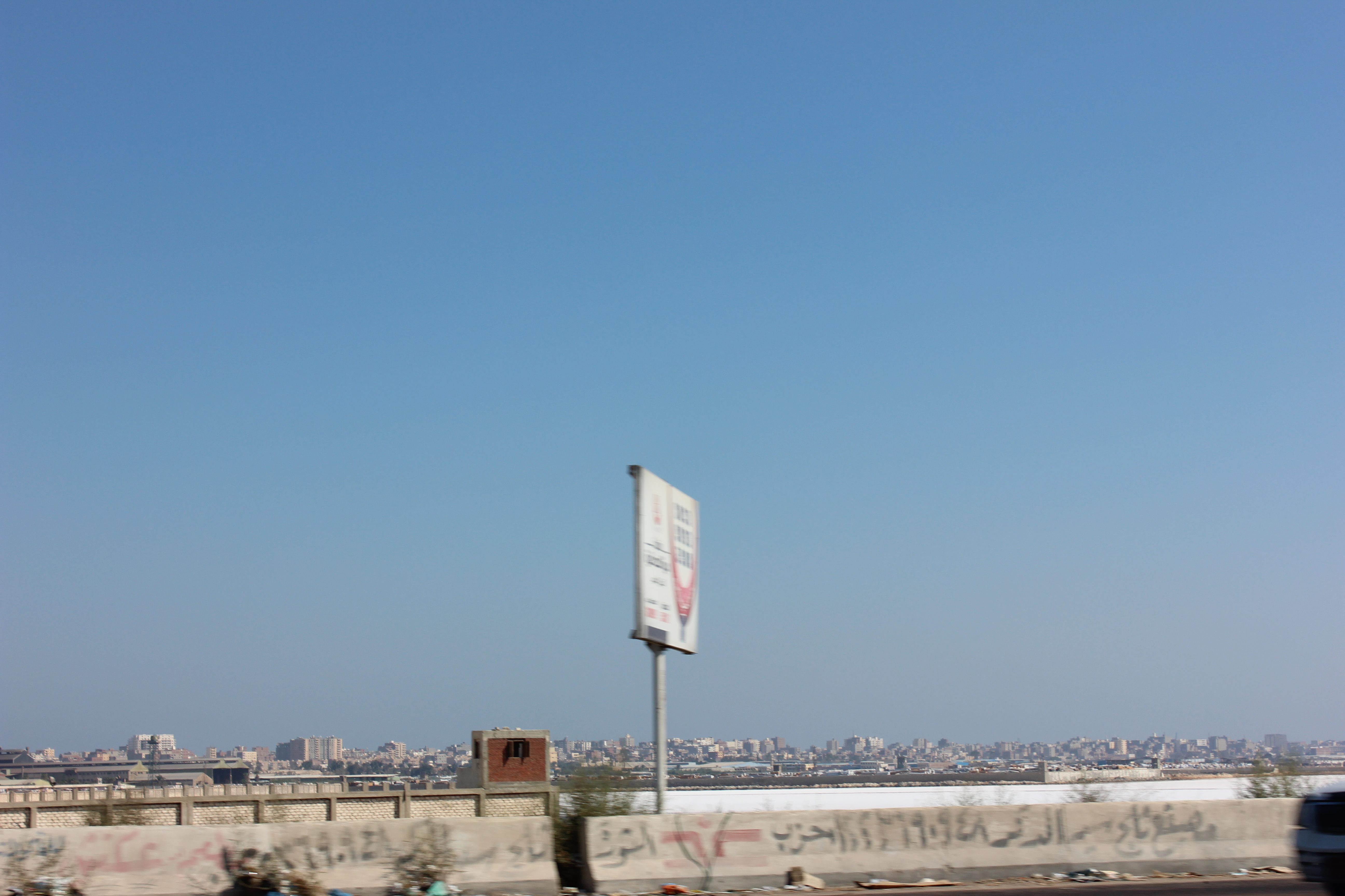 الطريق الدولي الساحلي بالإسكندرية.